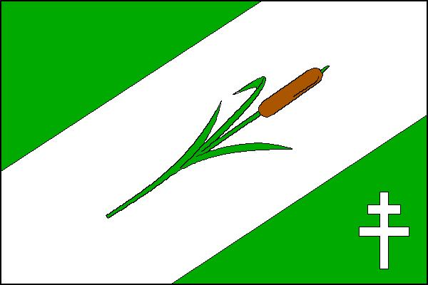 Vlajka obce Rohozec v okrese Brno-venkov